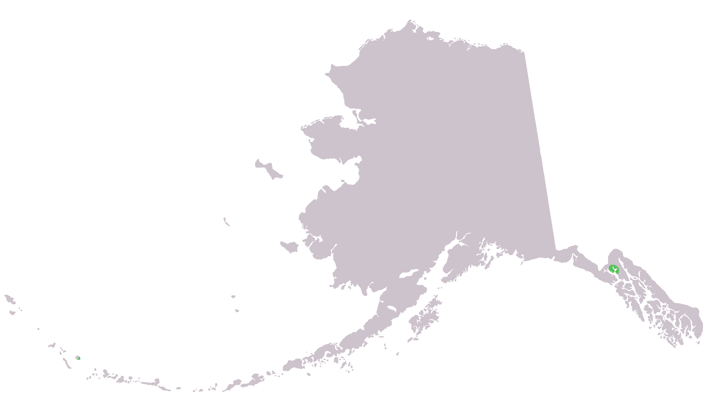 Range of Sorex alaskanus in Alaska.